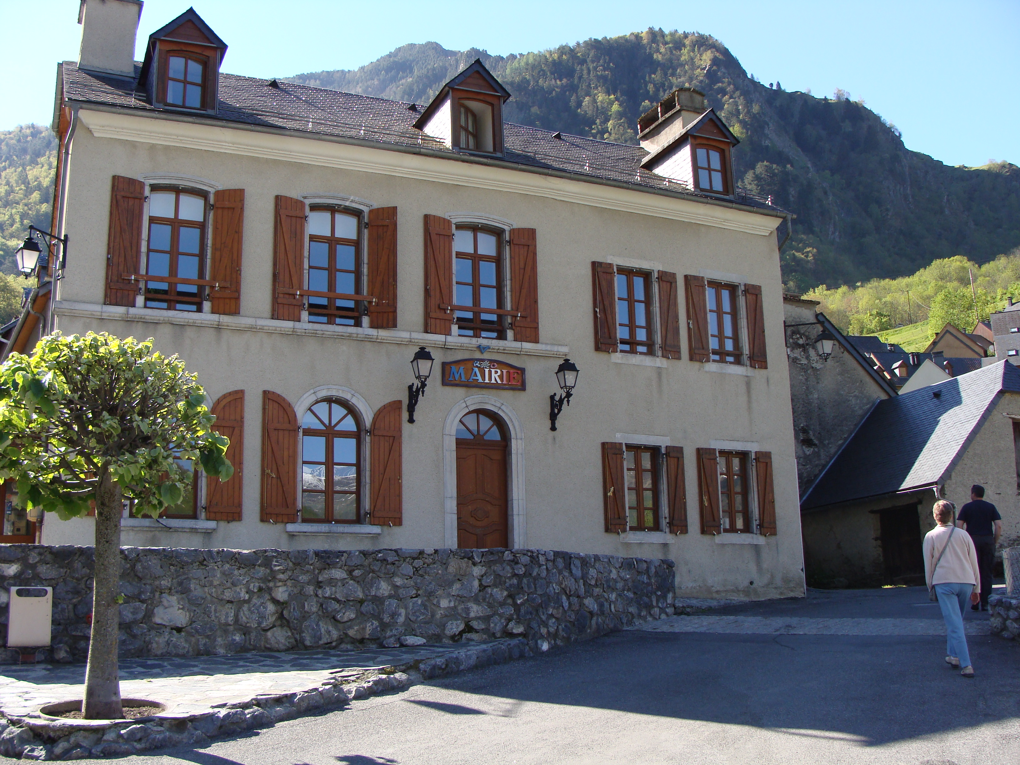 Viella (Hautes-Pyrénées) - Mairie